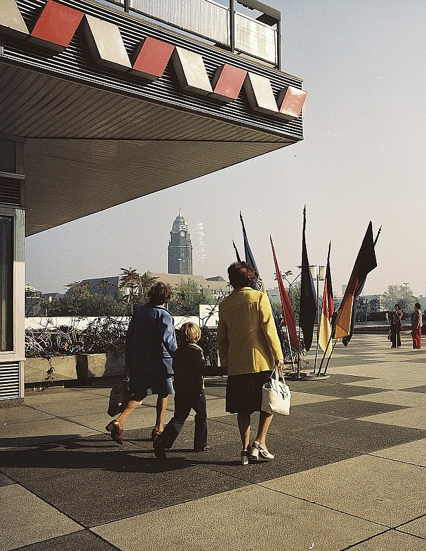 Original image description from the Deutsche Fotothek Dresden.Blick über die Prager Straße zum Rundkino und Rathaus